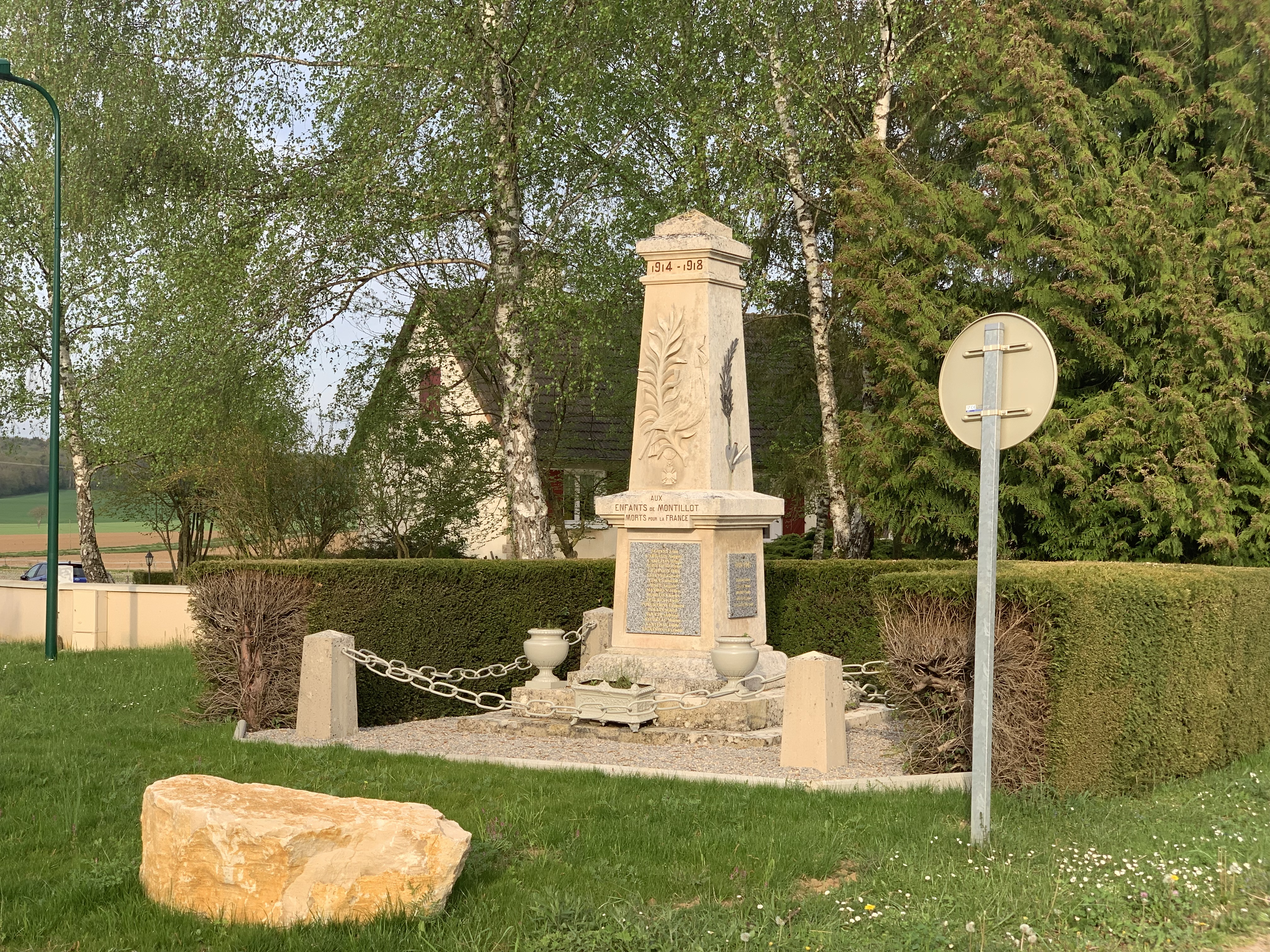 Monument aux morts de Montillot (Yonne, France).